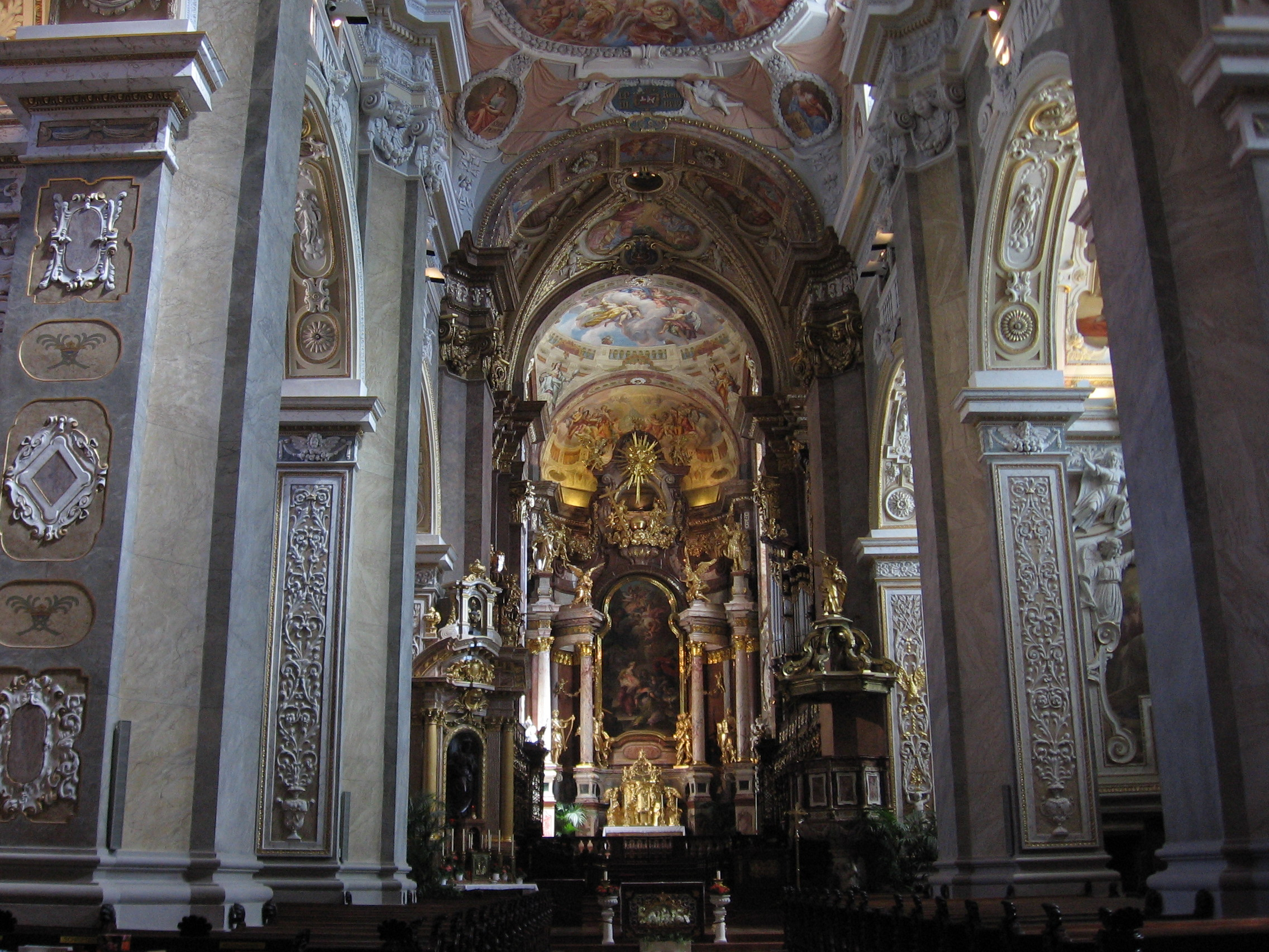 Stift Klosterneuburg